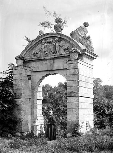 Porte monumentale du château de Sorel-Moussel, Eure-et-Loir (France) par Mieusement, sans date.